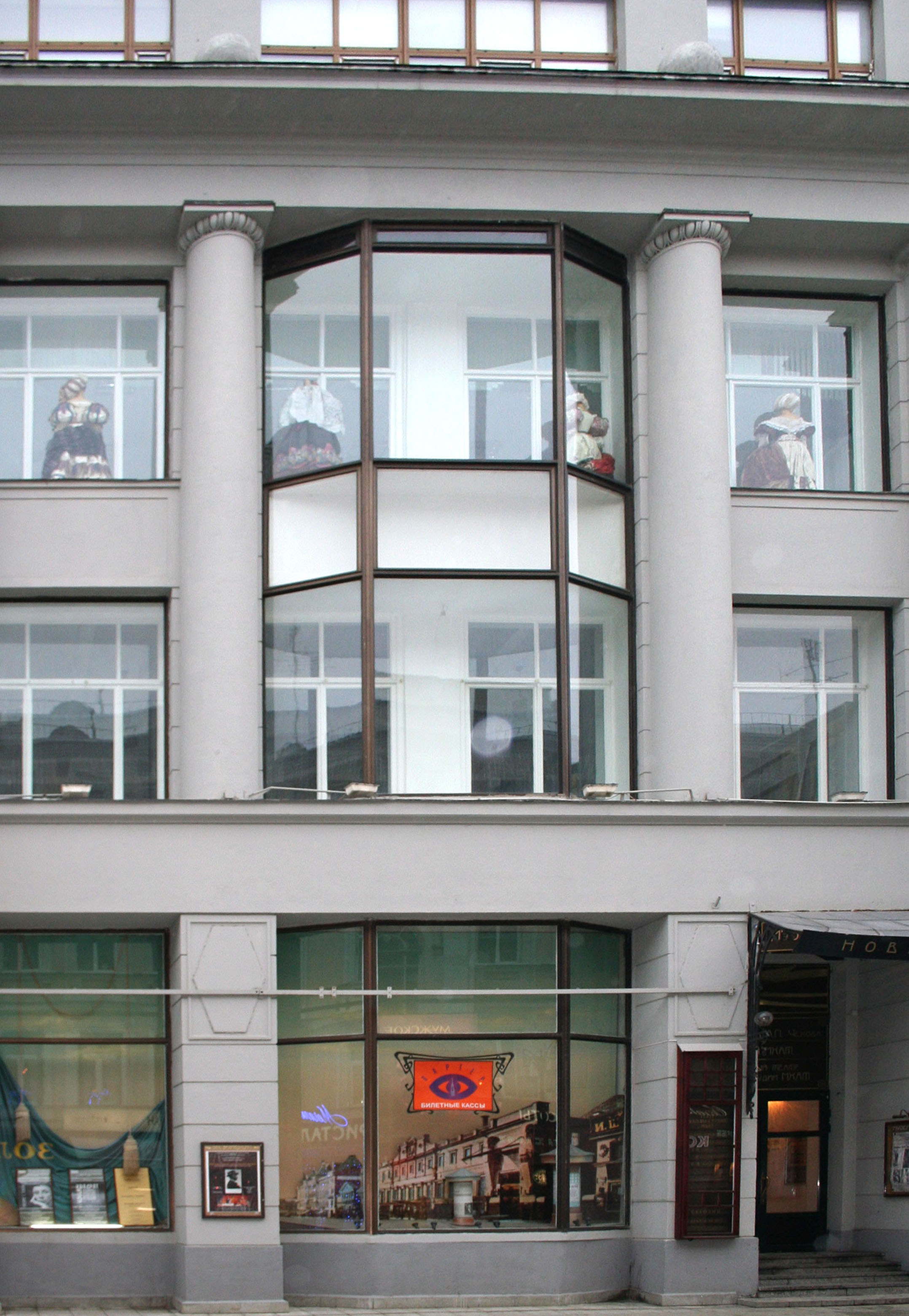 Камергерский переулок, д3а